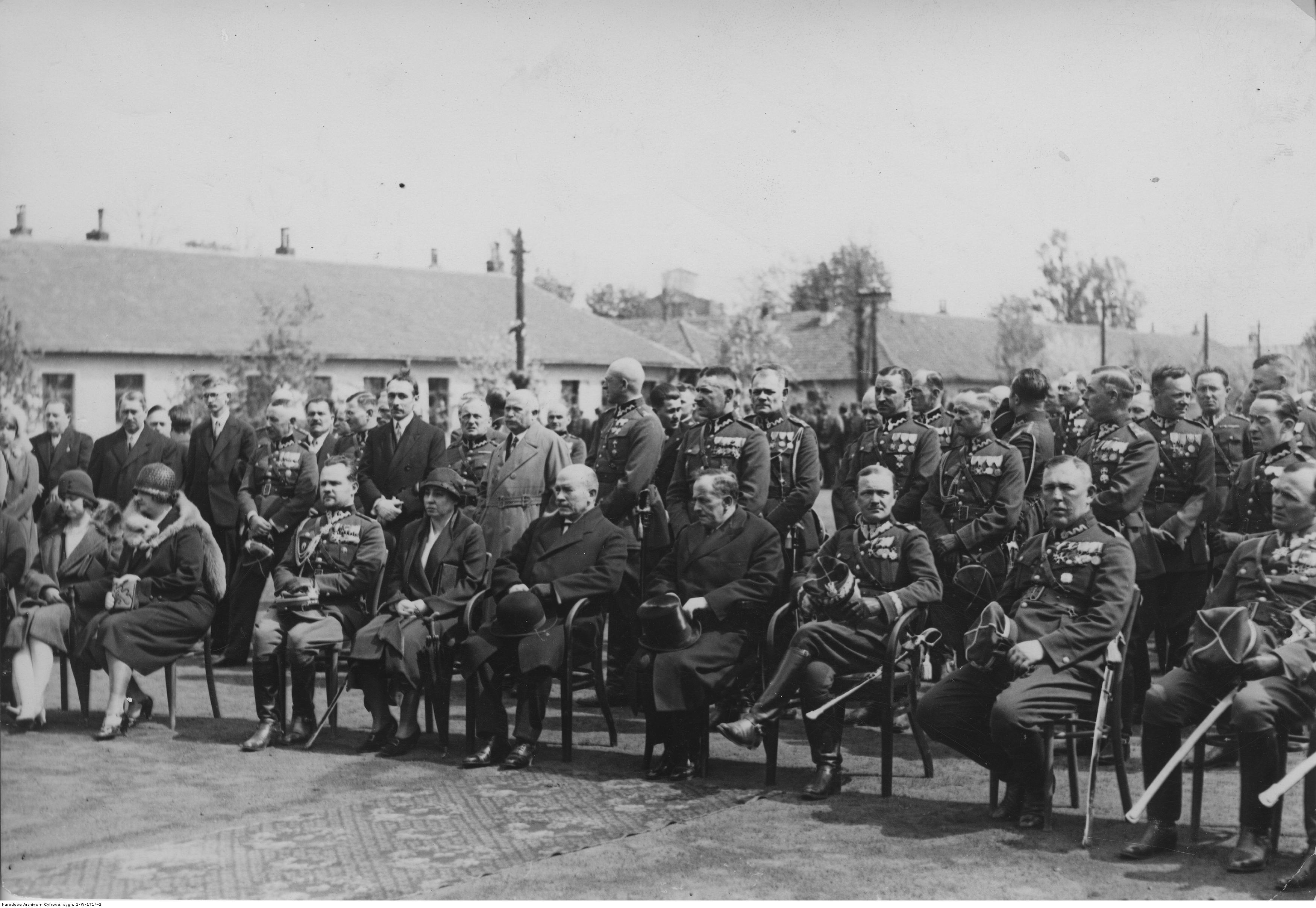 Święto 5 Batalionu Saperów w Krakowie; maj 1929. Fragment uroczystości. Siedzą od prawej: płk Stanisław Kruk-Schuster, płk Bernard Mond, gen. Mieczysław Smorawiński, minister Ignacy Boerner, wicewojewoda krakowski J. Mikosz, NN, płk Marian Bolesławicz. Koncern Ilustrowany Kurier Codzienny - Archiwum Ilustracji. Sygnatura: 1-W-1714-2